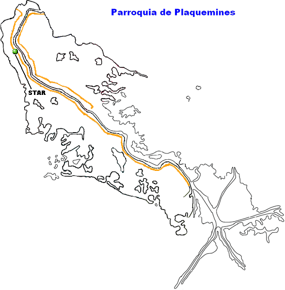 Star, Lousiana.